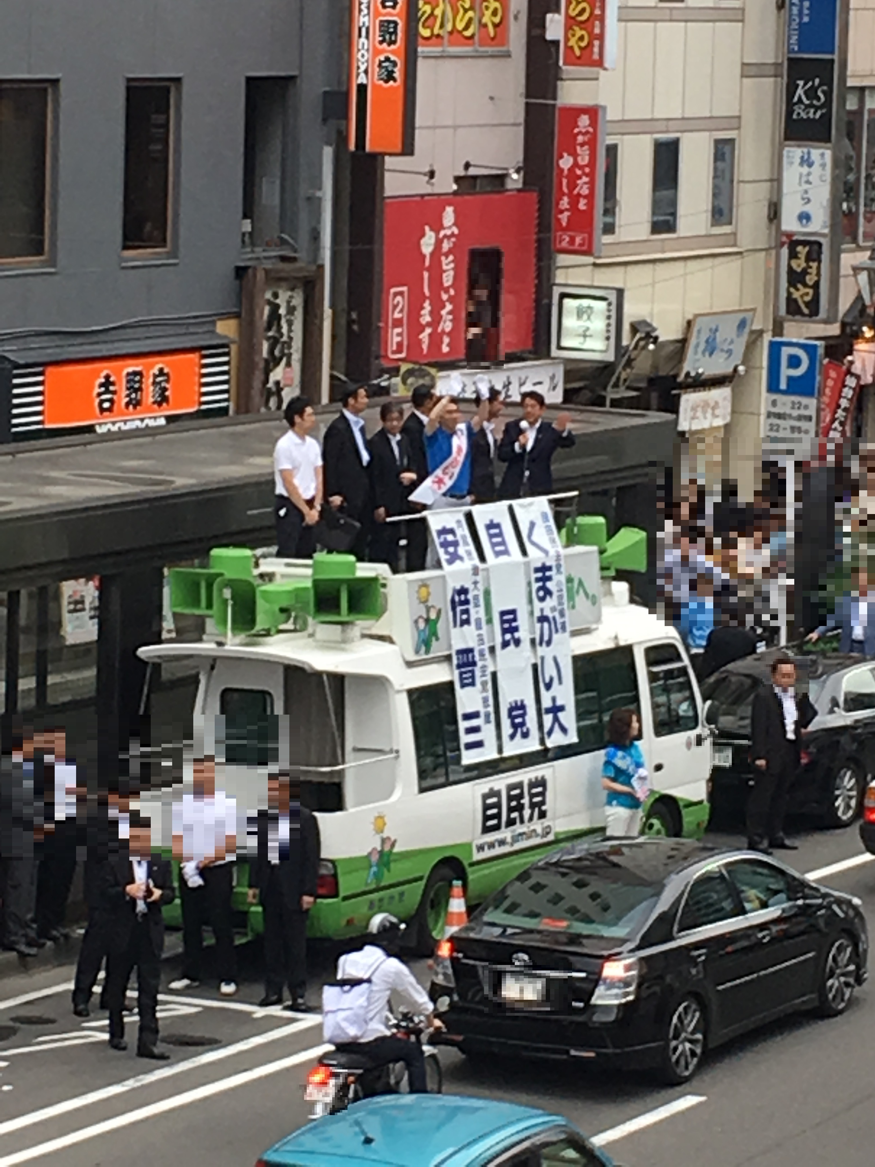 安倍晋三、熊谷大、土井亨、高階恵美子。2016年6月25日、第24回参議院議員選挙宮城選挙区街頭演説にて。